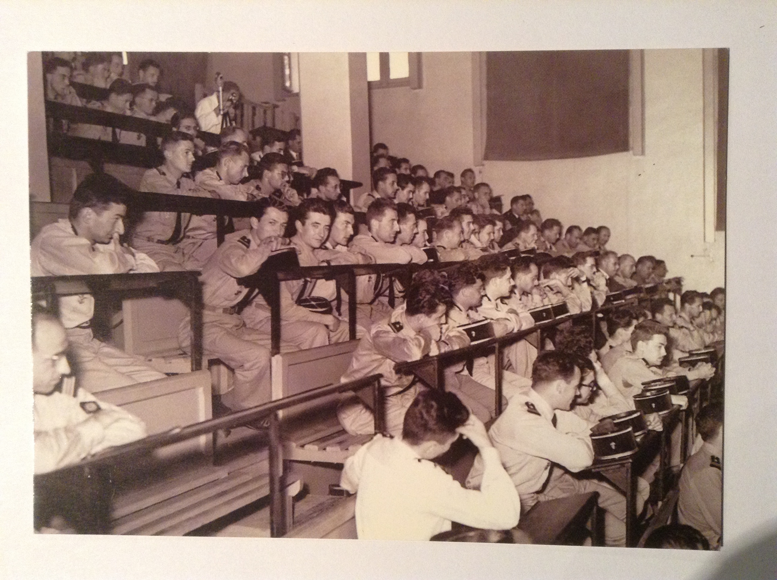 La promotion 1960 de l'école du Pharo lors de l'amphi de choix des postes